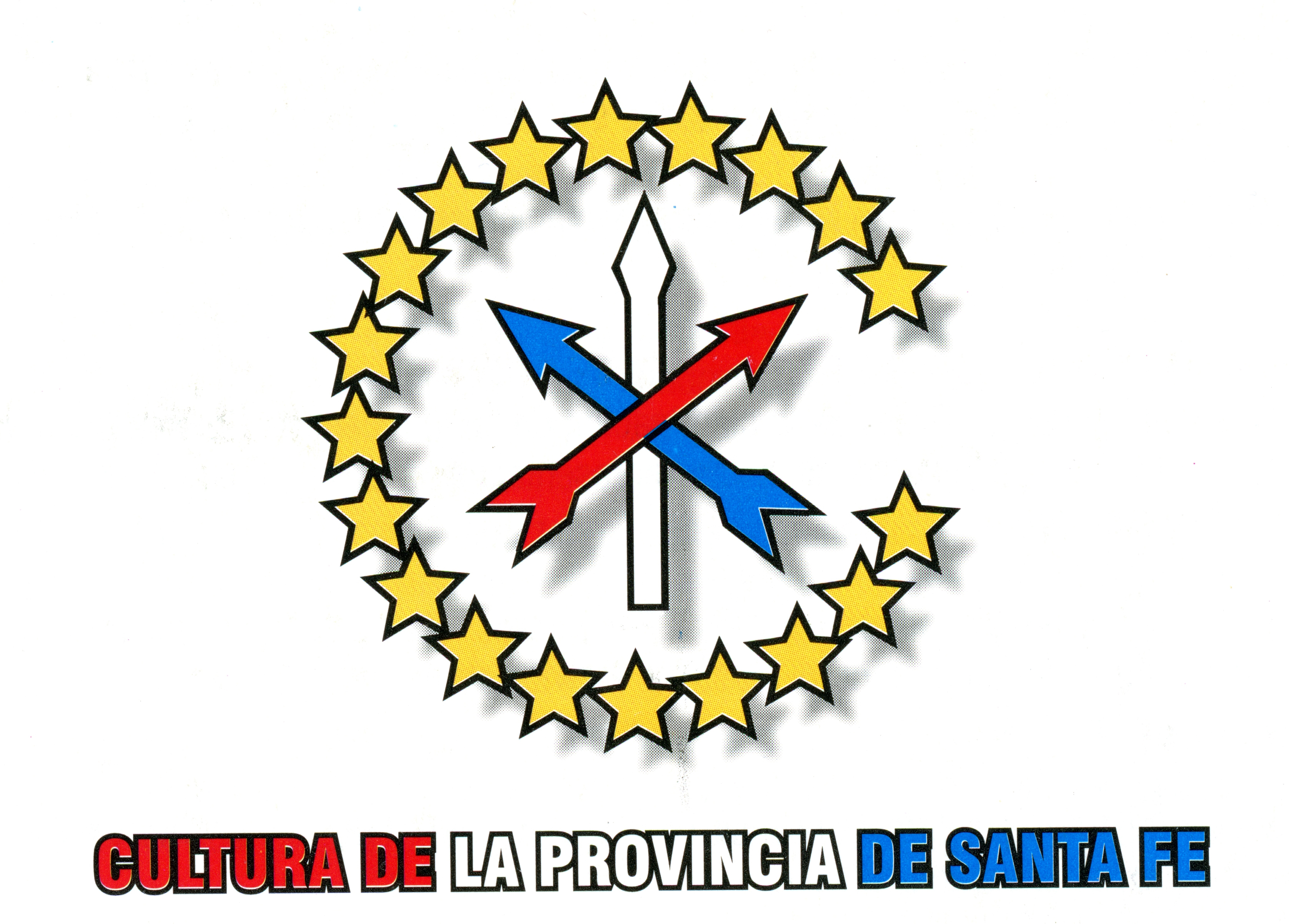 Logotipo creado y utilizado por la Subsecretaría de Cultura de la Provincia de Santa Fe, Argentina, durante la gestión de Enrique Llopis en los años 1996_97. Diseñado por "el Tomi".